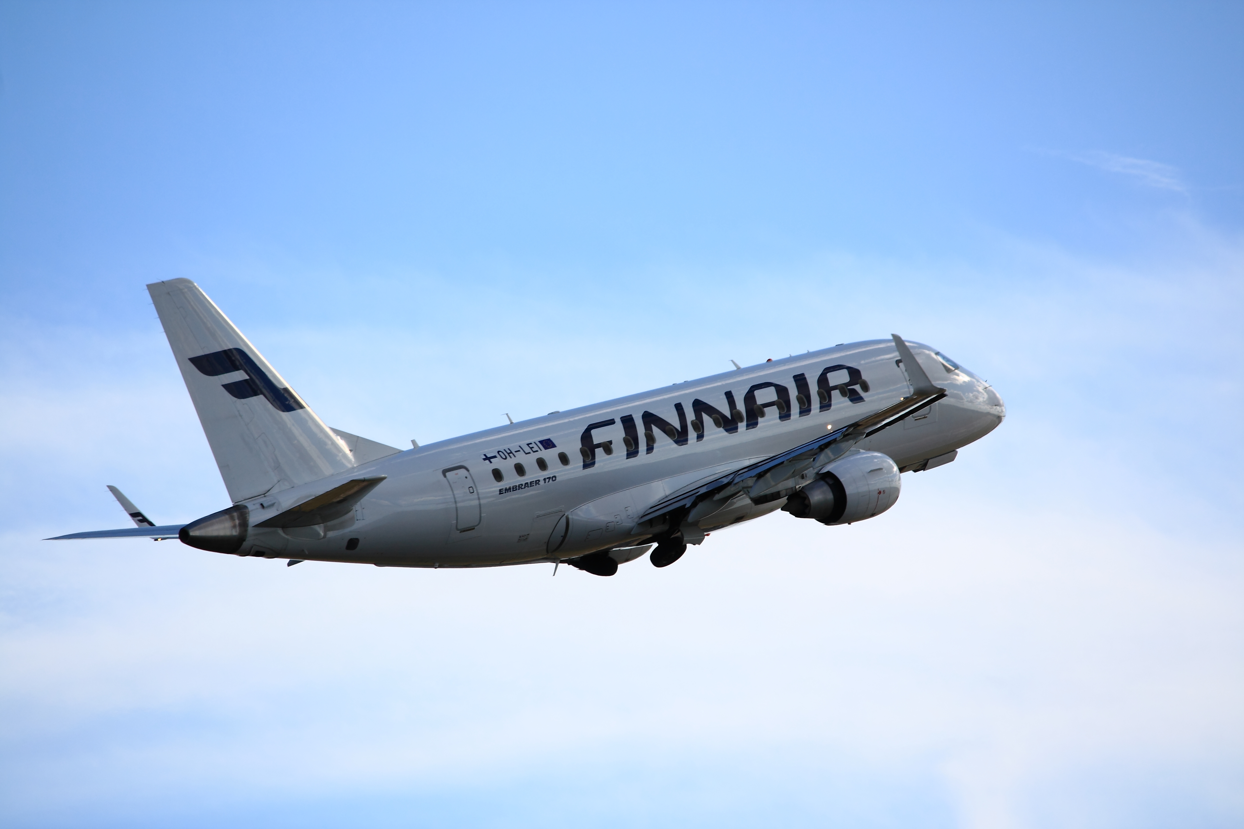 Finnair Embraer ERJ-170 OH-LEI departure Helsinki-Vantaa rwy 22R